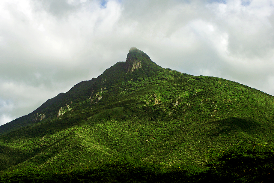 En el centro de la península de Paraguaná en el Estado Falcón se encuentra el Monumento Natural Cerro de Santa Ana, para quien no lo conoce es un espacio asombroso a mas de 800 mts del altura donde el turista ni puede imaginarse lo contrastante del clima ya que se pasa de una zona cálida y árida de playas a un clima de selva húmeda y fresca en momentos fría, vale la pena leer, conocer, estudiar y vivir la experiencia.